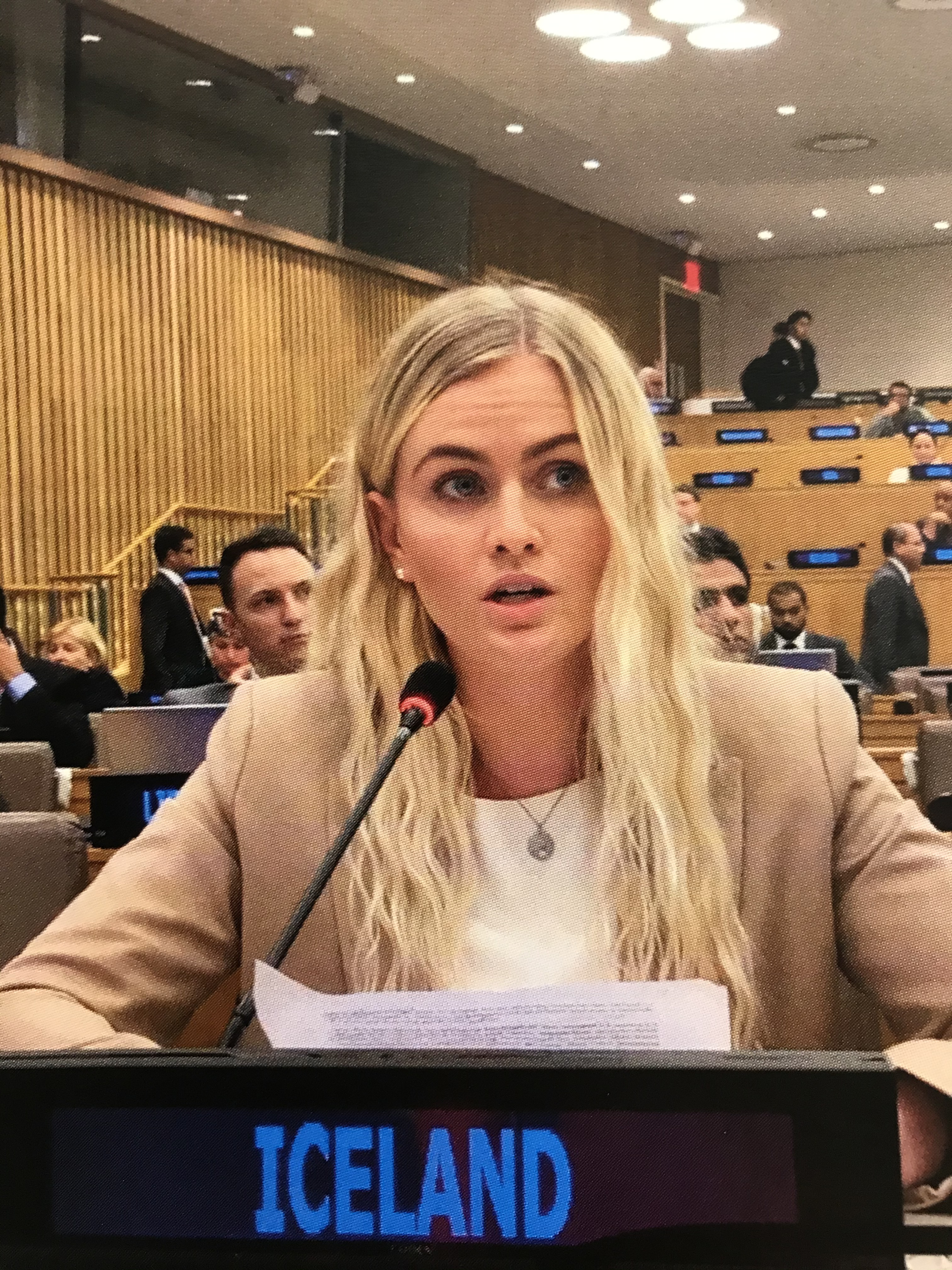 Ungmennafulltrúar LUF hjá SÞ